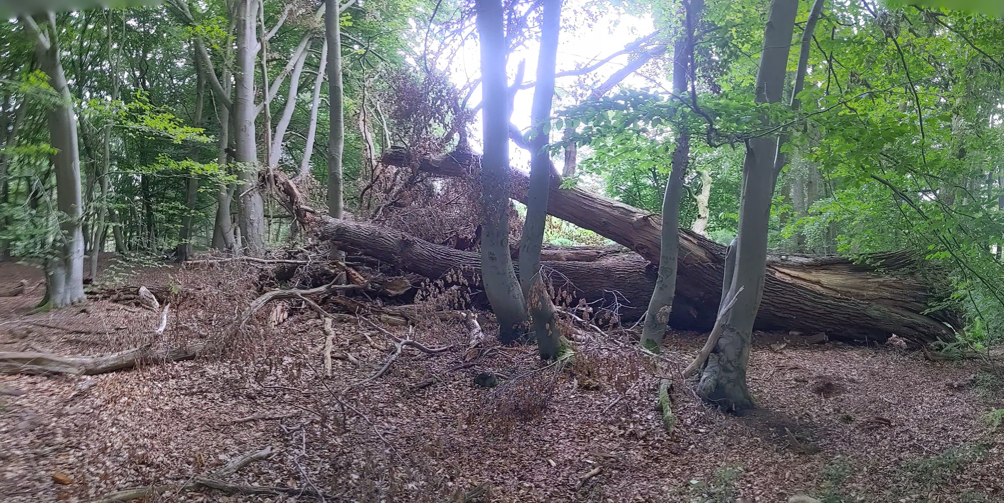 Umgestürzte Stieleiche am Herschel, Herongen Denkmalnummer ND 31